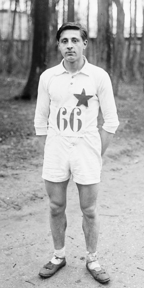 29-1-22, Saint-Cloud, [Paul] Bontemps, vainqueur du challenge Guillemare [cross-country] : [photographie de presse] / [Agence Rol]